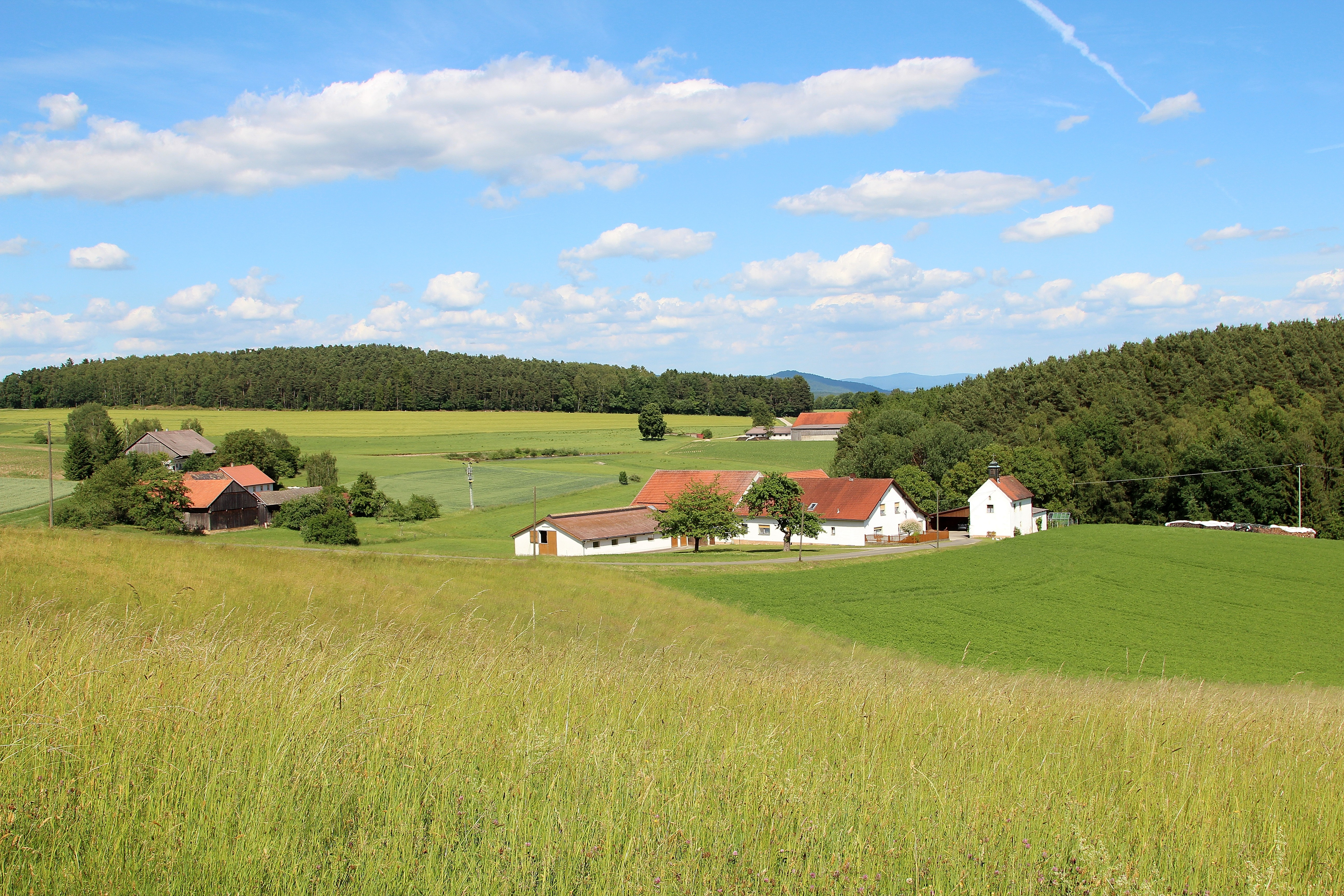 Könneröd, im Hintergrund Gonnersdorf, Stadt Neunburg vorm Wald; Landkreis Schwandorf, Oberpfalz, Bayern